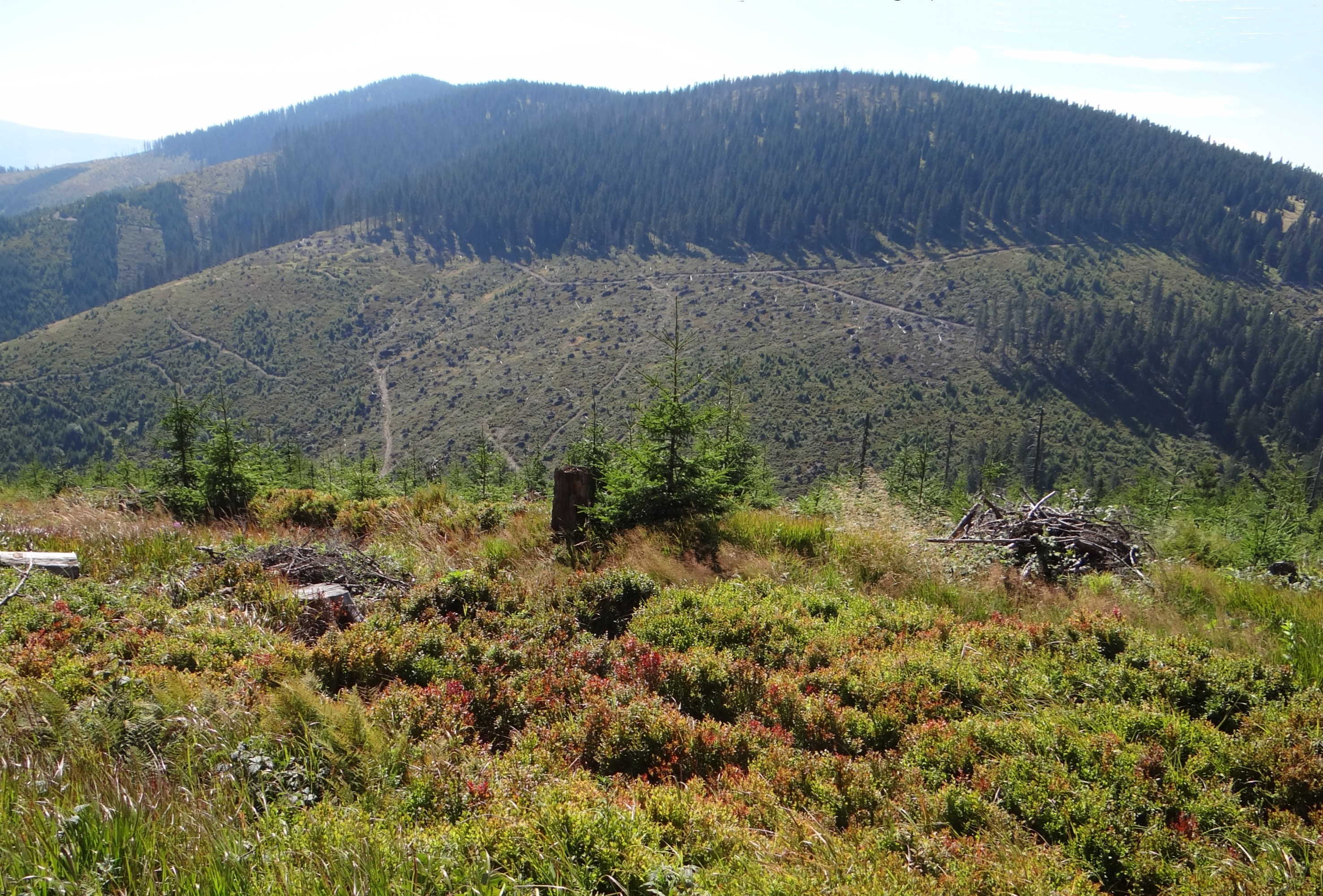 Smrekovica